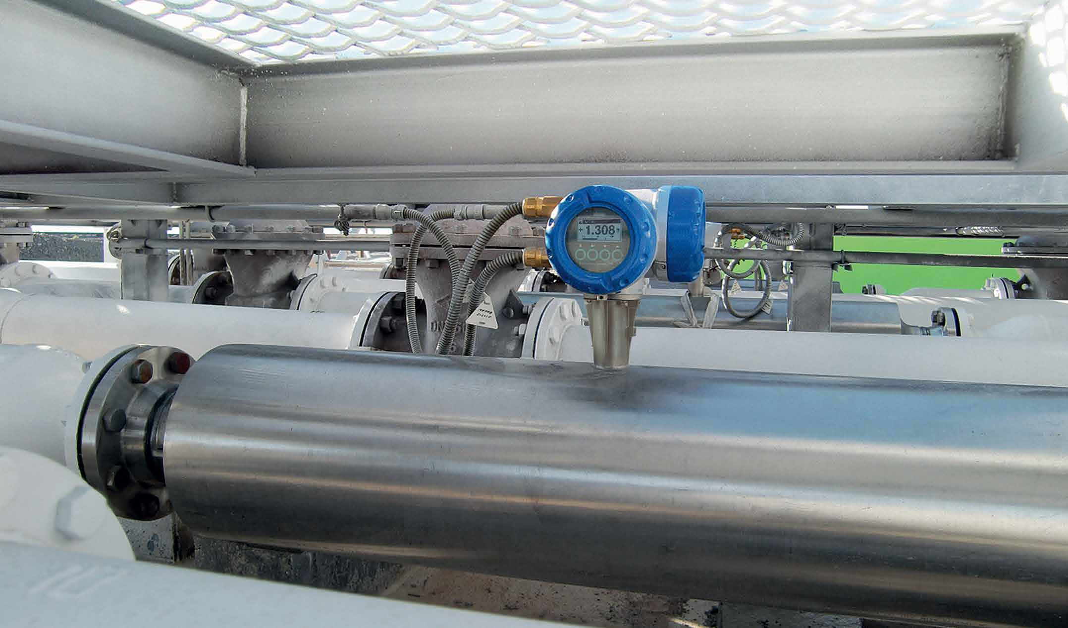 Расходомер массовый